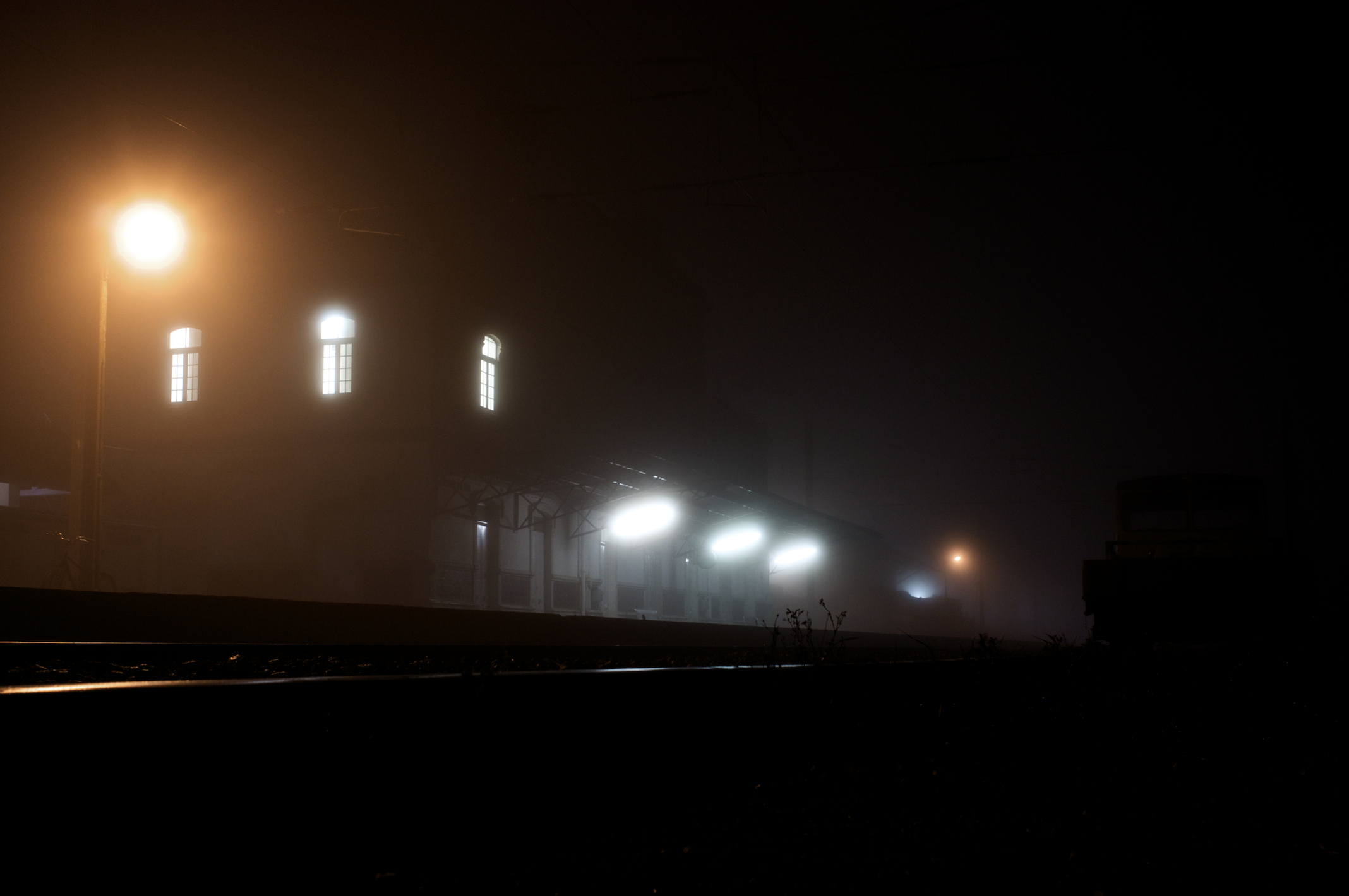 Tipo: EC [Estação de Concentração] Local: Alcácer do Sal [Linha do Sul, PK 78] Data e hora: 4 de Março de 2010 [03h17]